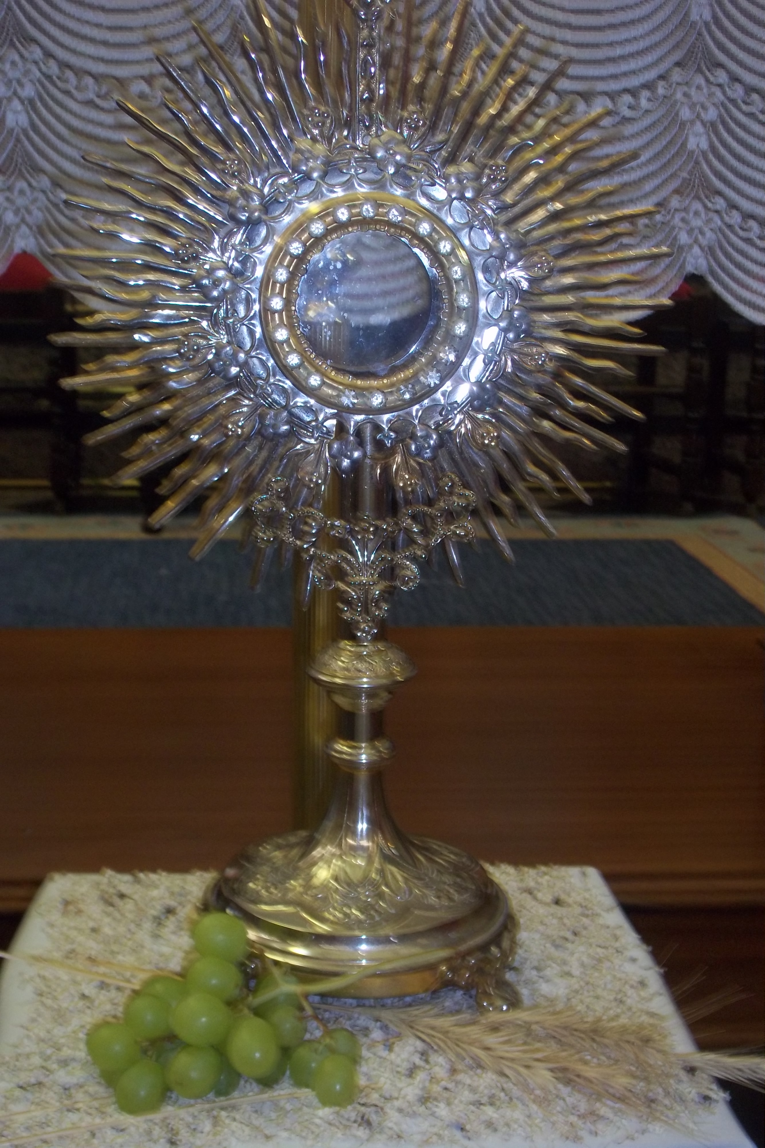 La fiesta del Corpus Christi se celebra tradicionalmente haciendo altares en las casas y, desde hace unos años, realizando alfombras por las calles.